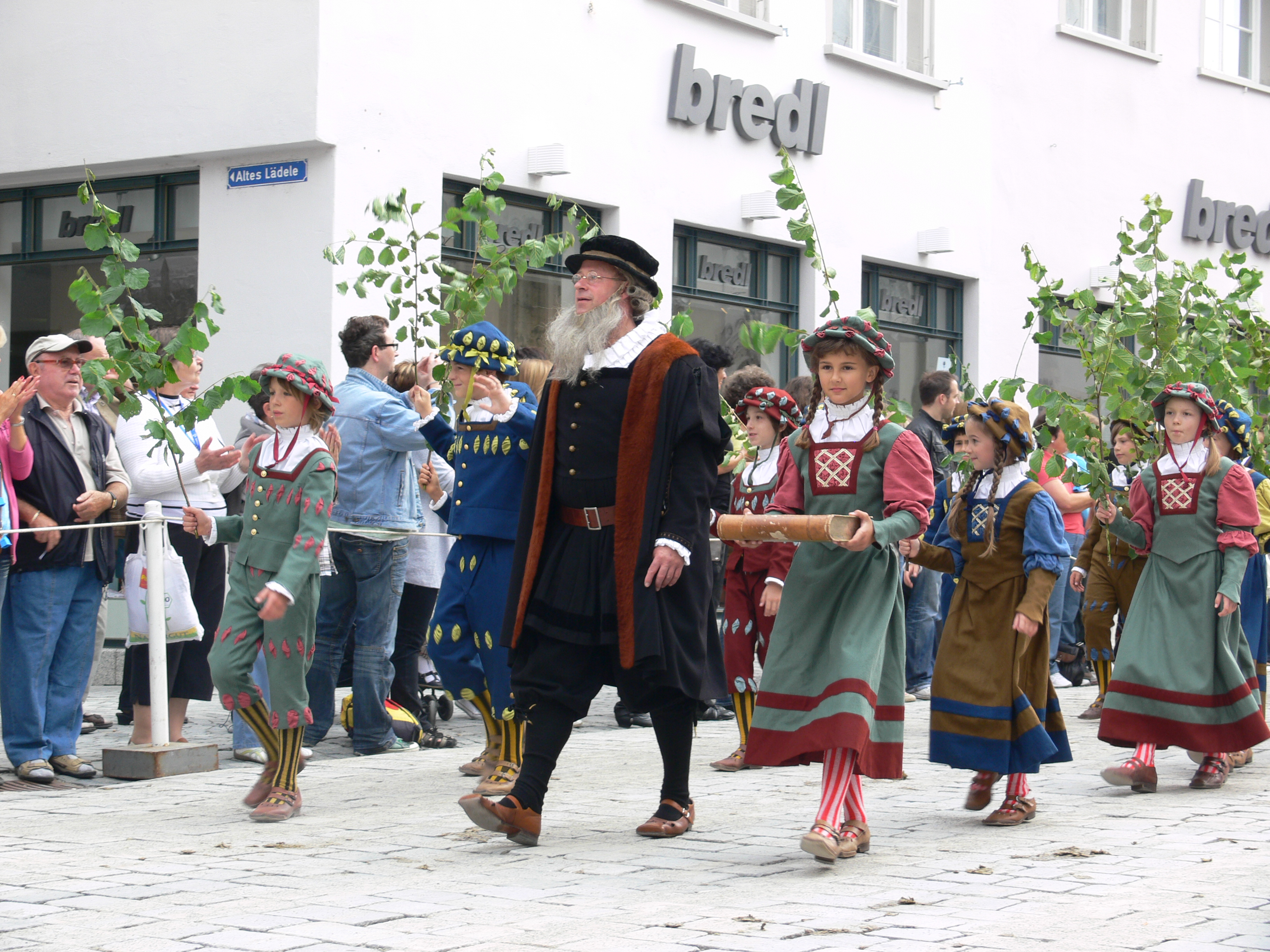 Rutenkinder mit Magister, Festzug am Rutenfest Ravensburg 2010